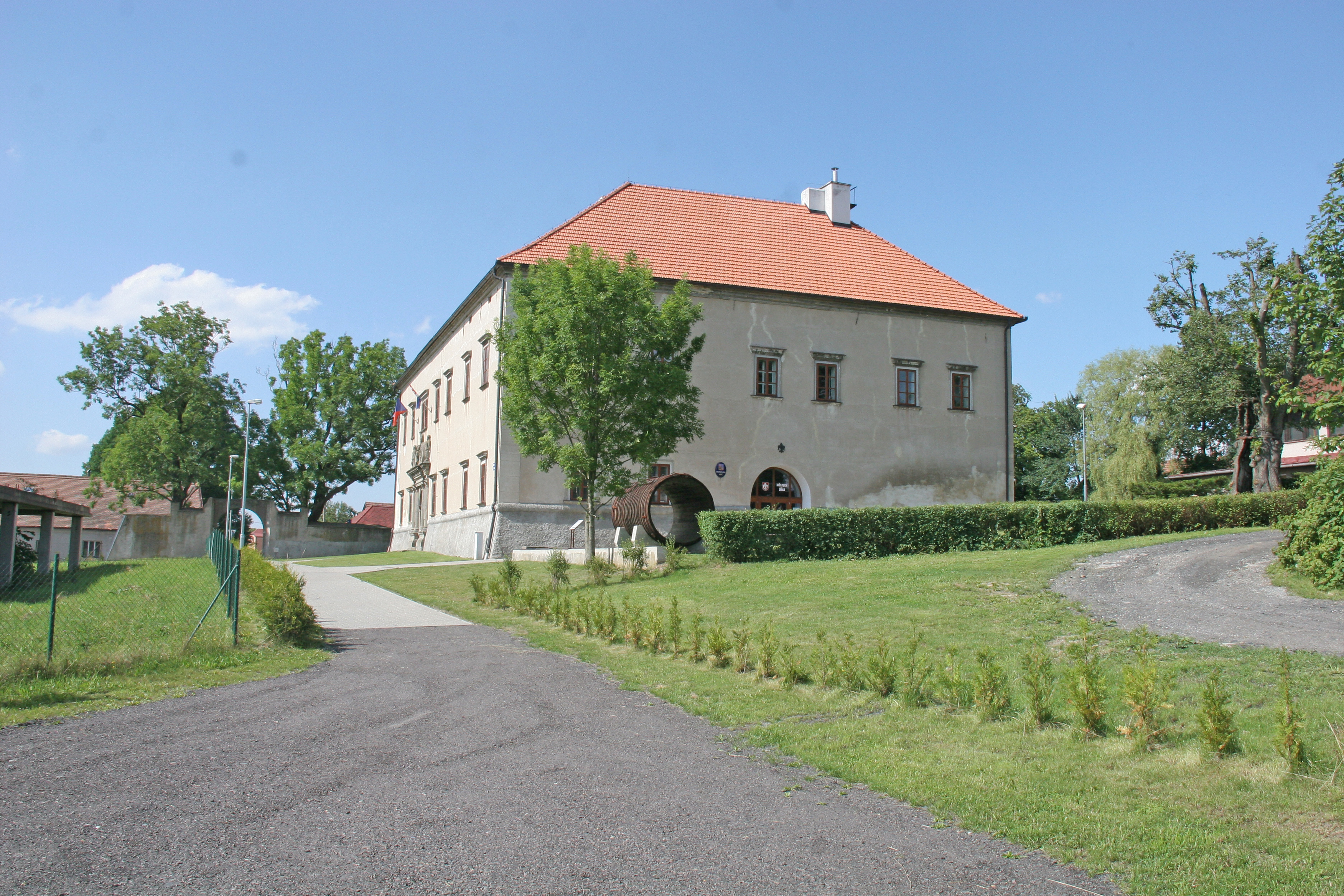 Seč zámek